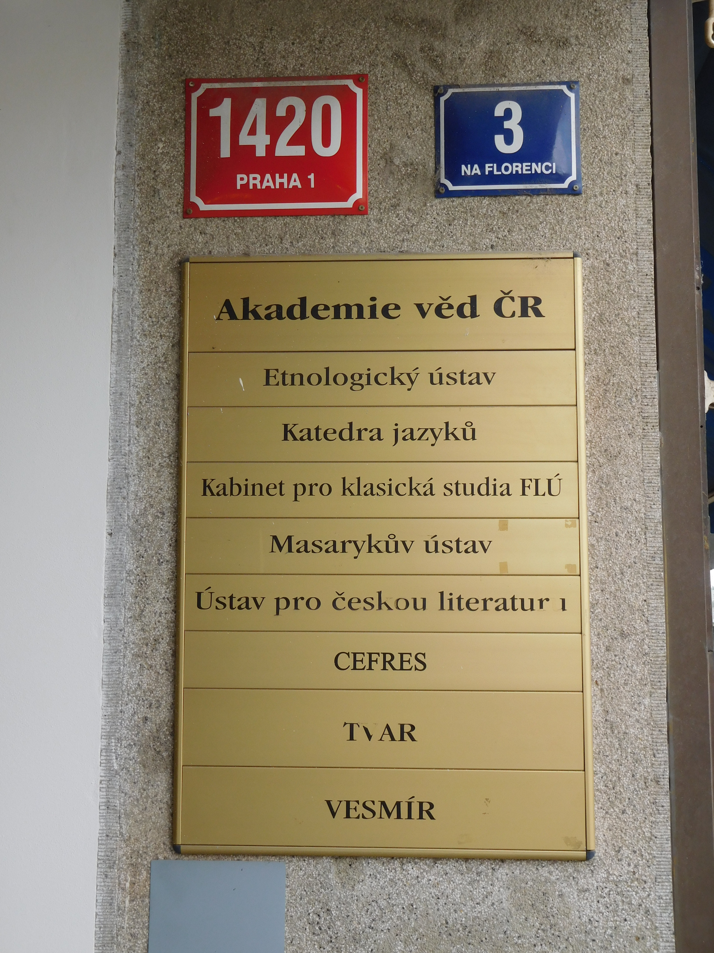 Praha - Nové Město, Na Florenci 3, Palác Ferra - cedule